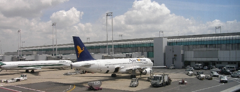 Der Flughafen Rom Fiumicino und eine Maschine der Air One